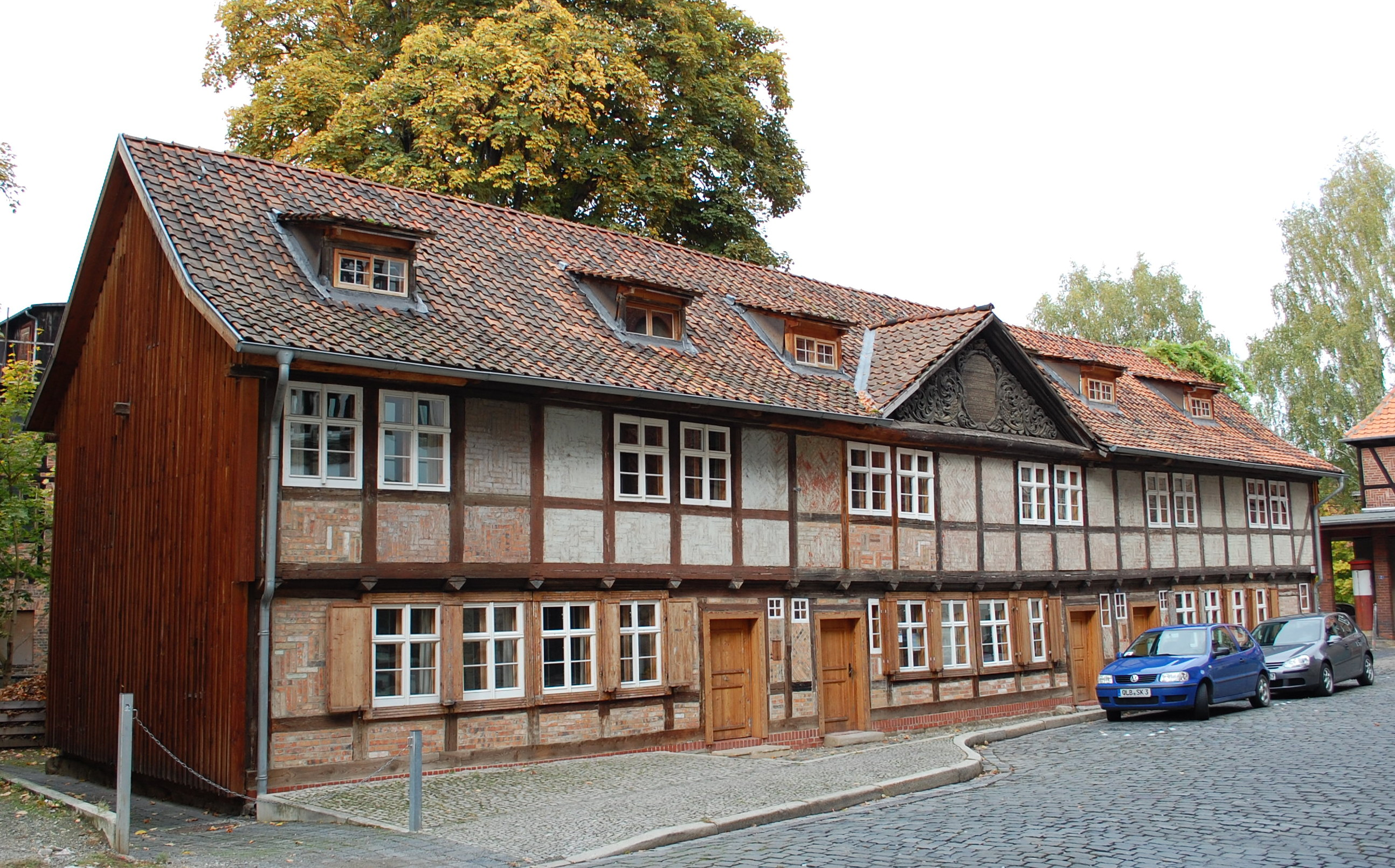 Haus Am Hospital 1 in Quedlinburg